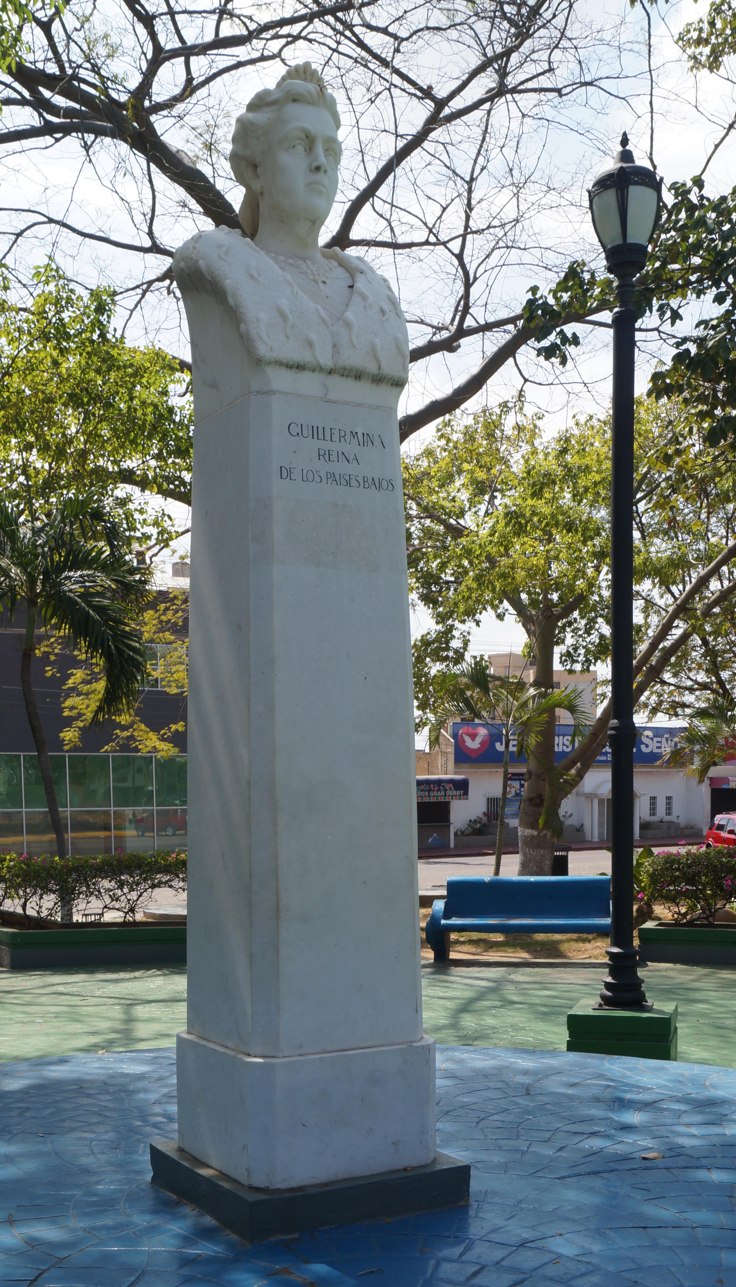 Monumento Reina Guillermina, ubicada en la plaza de su mismo nombre. Su nombre fue colocado para honrar a la comunidad holandesa y su reina en 1953. Maracaibo. Venezuela.